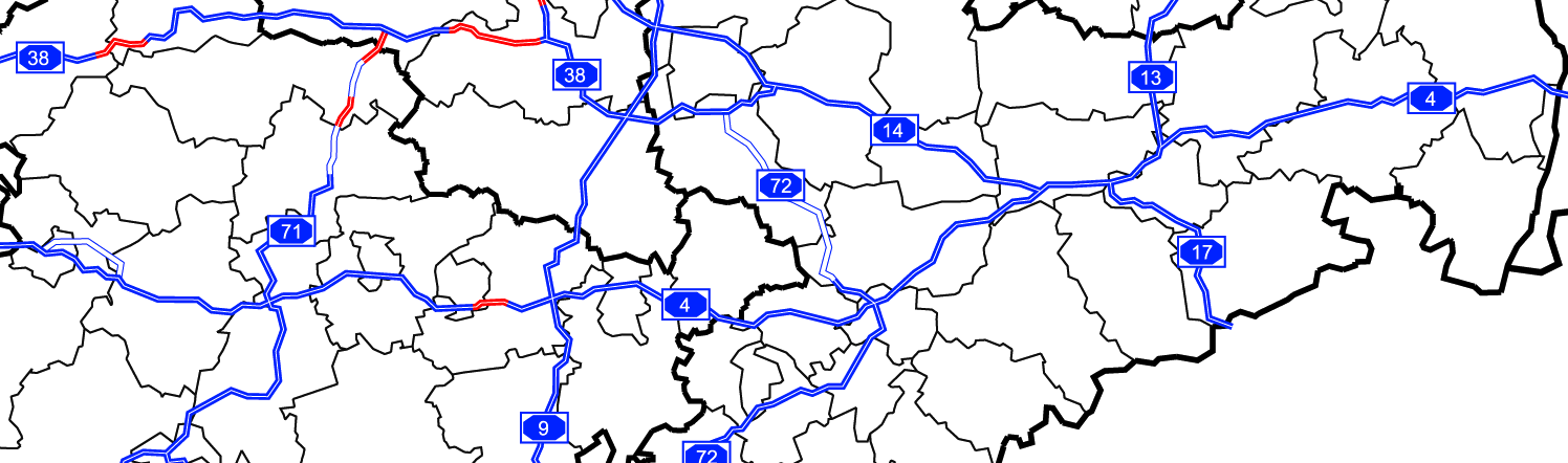 German federal highway 4 in context with county and state borders, Bundesautobahn 4 im Kontext anderer Autobahnen und Landkreis- und Ländergrenzen